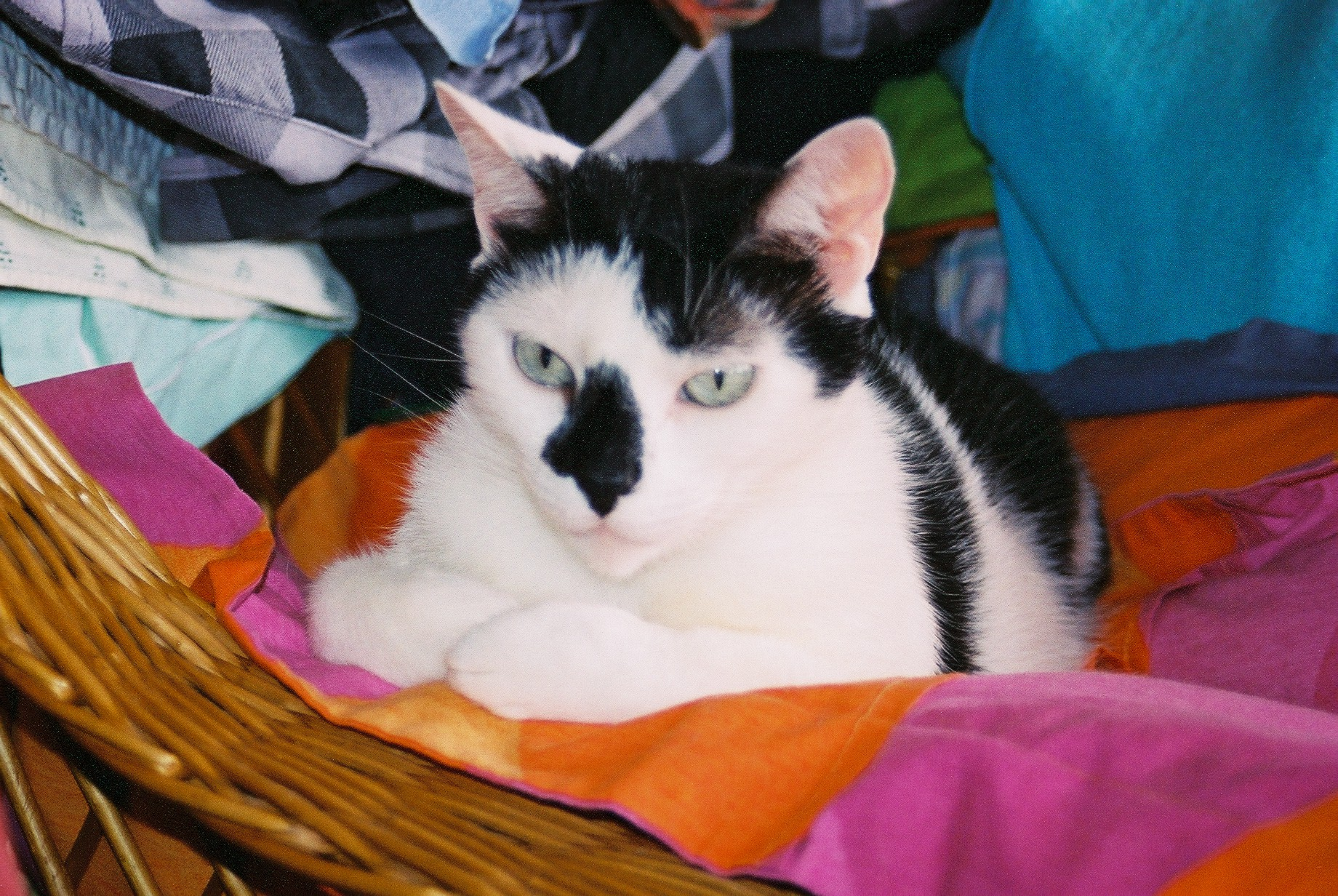 chat domestique